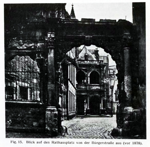 Köln,Toreingang zum Rathausplatz von der Bürgerstraße